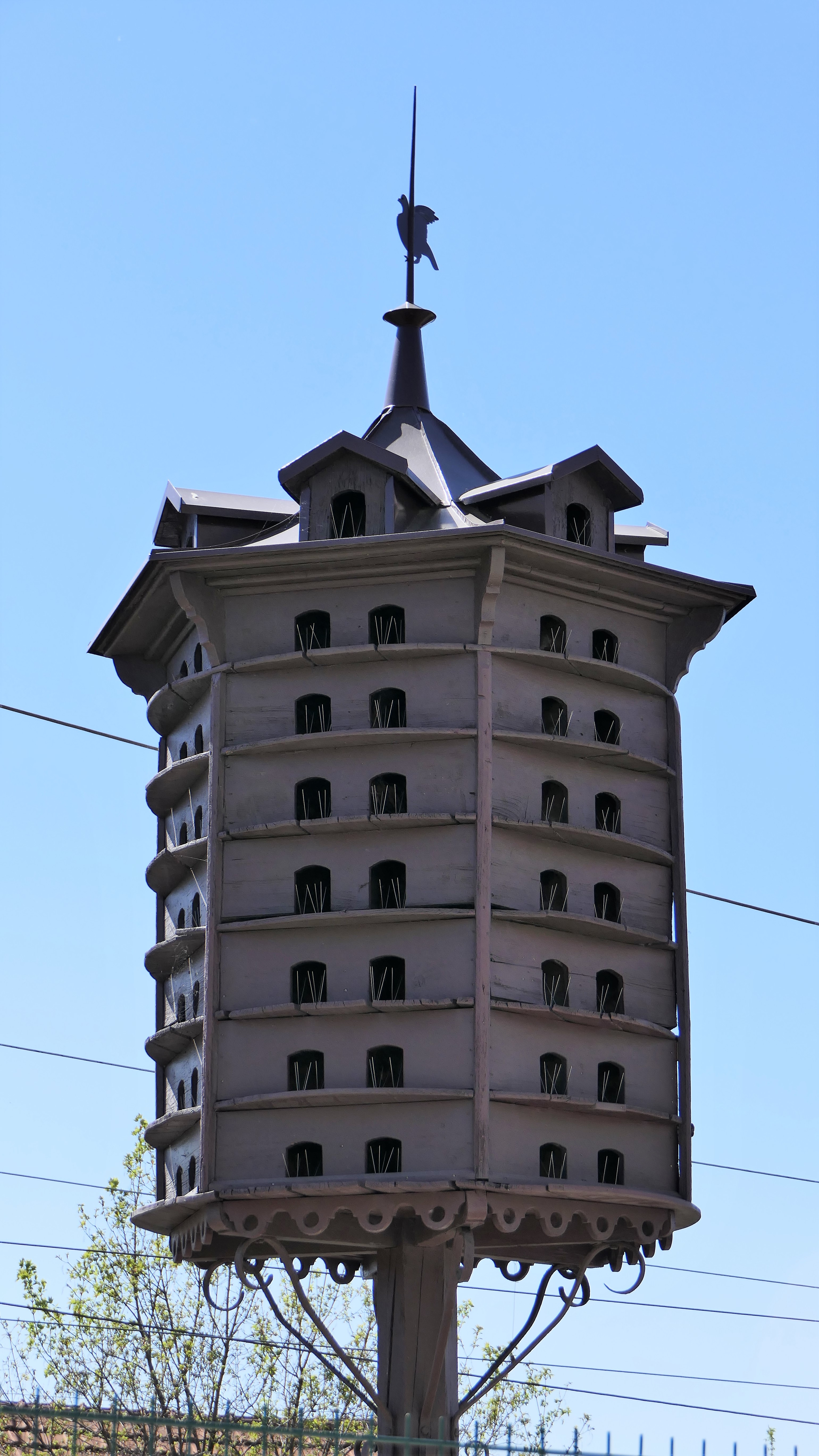 Sechseckiges Taubenhaus in Leitmeritz